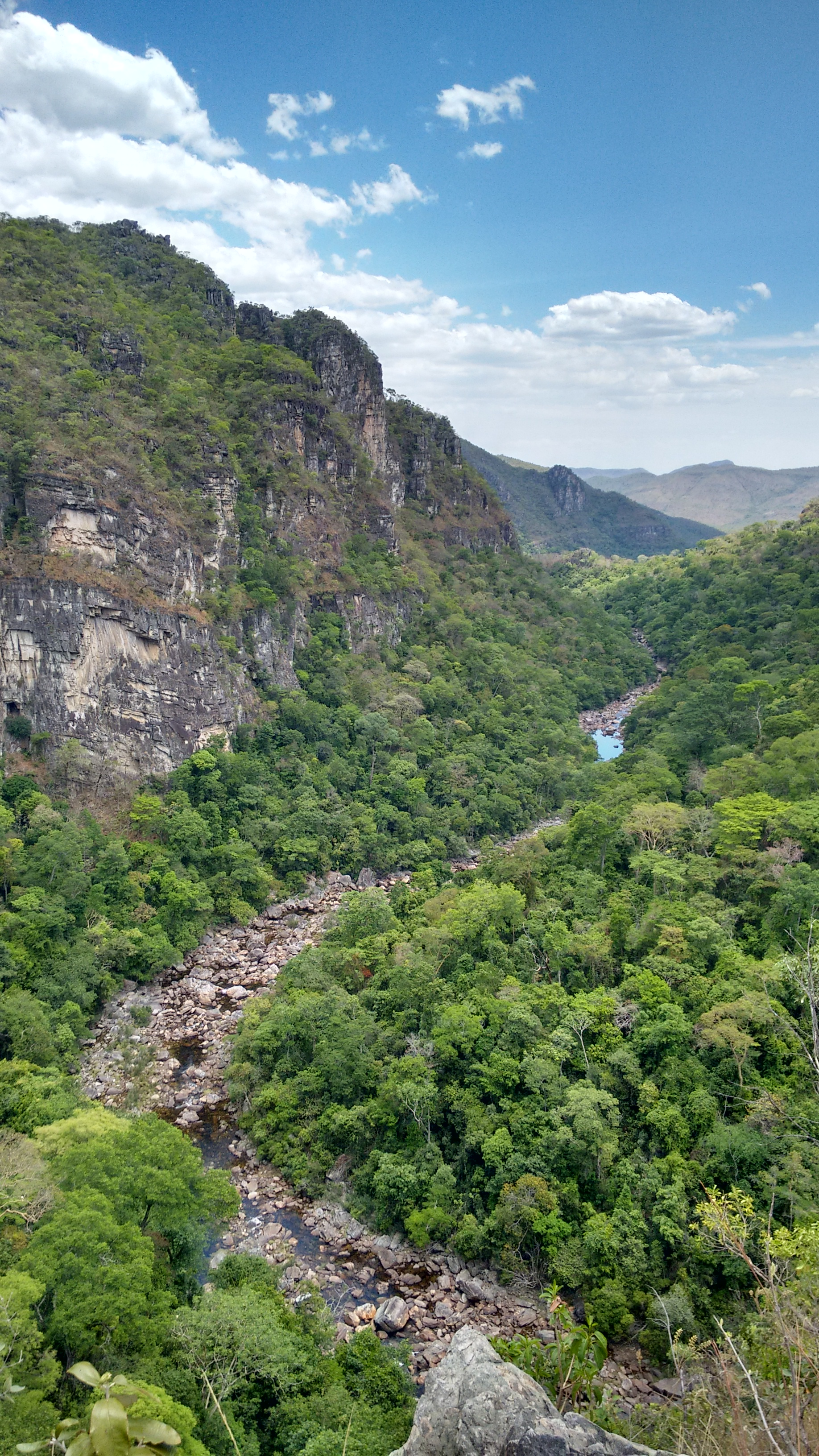 Vista do Rio Preto que segue abaixo do Salto de 120 metros